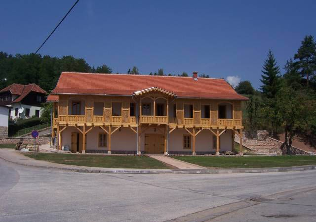 Цековића кућа и Палама